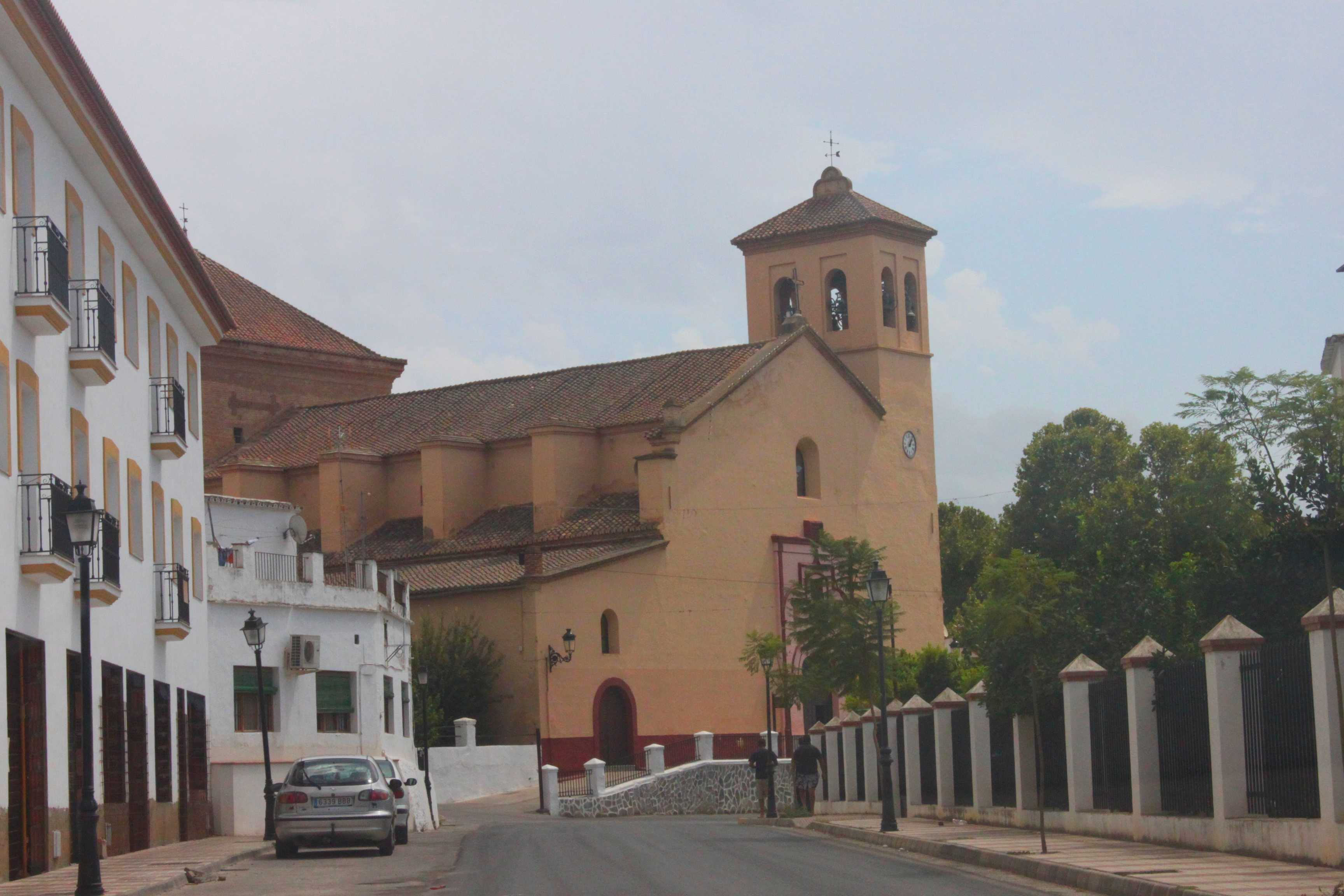 Kirche Iglesia de Ugíjar aus dem sechzehnten Jahrhundert